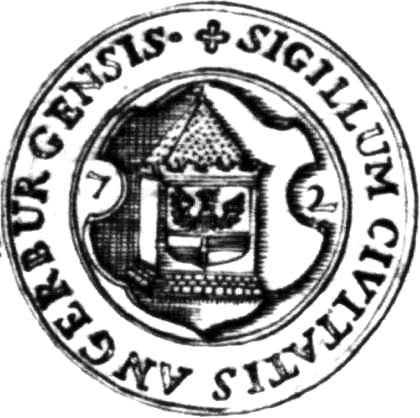 Mniejsza pieczęć Węgorzewa według: Ludwig Reinhold von Werner, 'Paleographiae patriae de oppido Angerburg eiusque sigillo; d.i. Historische Nachricht von der Stadt Angerburg und derselben Wappen, Specimen 2, Königsberg 1751 (Biblioteka Uniwersytecka w Toruniu, sygnatura 265295)